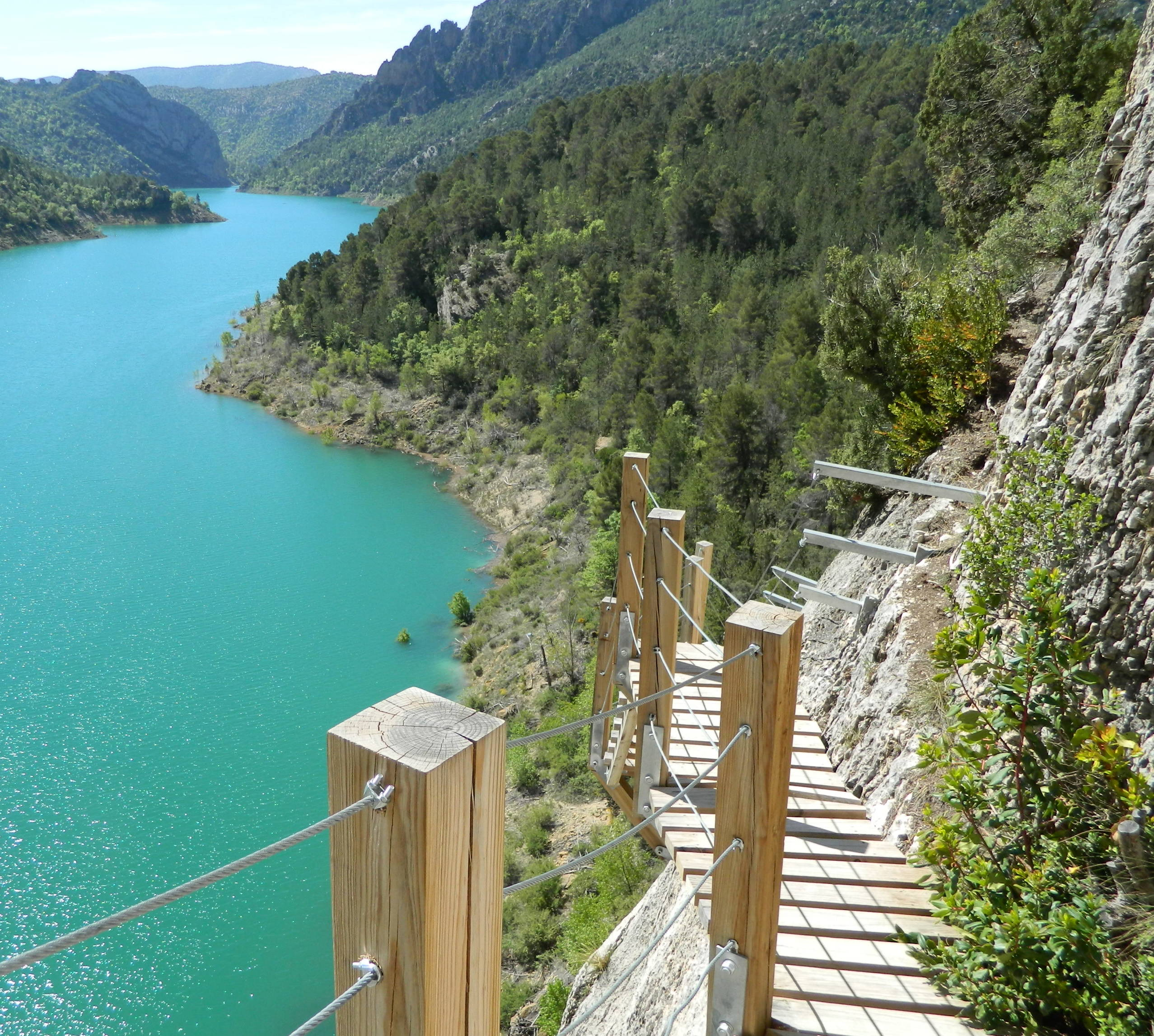 Congost de Montrebei. Ribagorza, Huesca/Lleida, Aragón/Cataluña, España